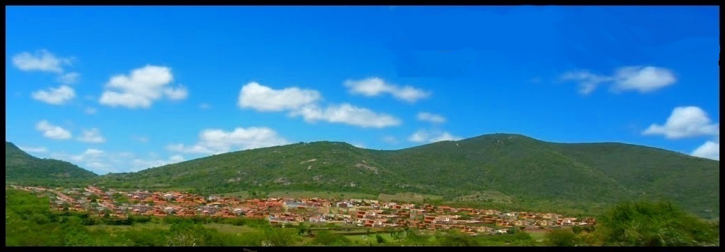 Algodões